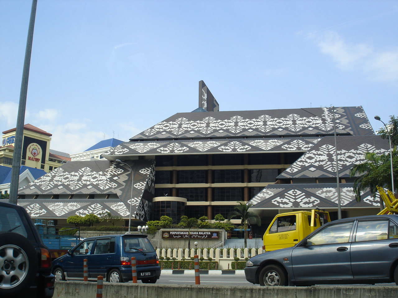 The Perpustakaan Negara Malaysia or National Library of Malaysia in Kuala Lumpur.